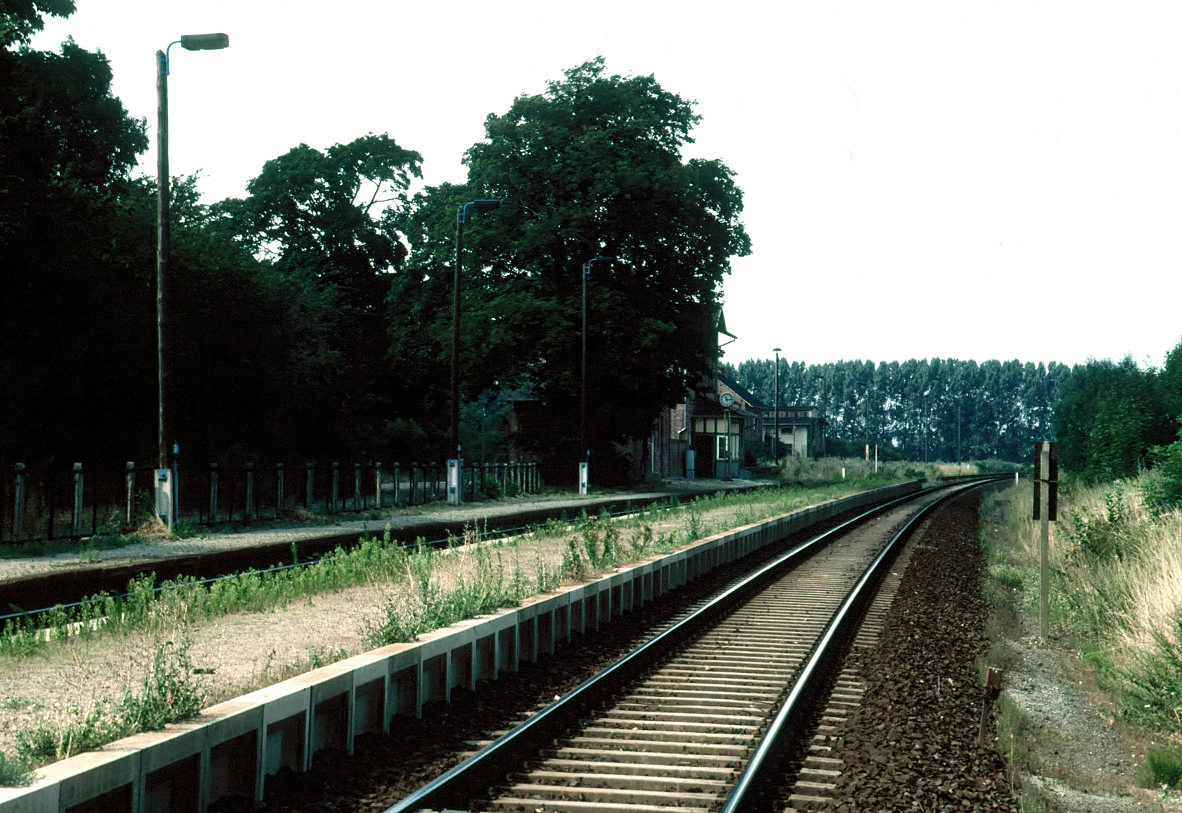 Ortsteil Krottorf von Gröningen in Sachsen-Anhalt - Bahnhof